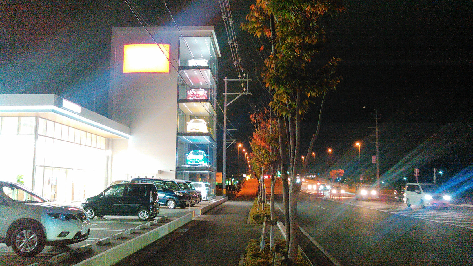 郡山市 内環状線 ダイハツ福島 タワー富田店前